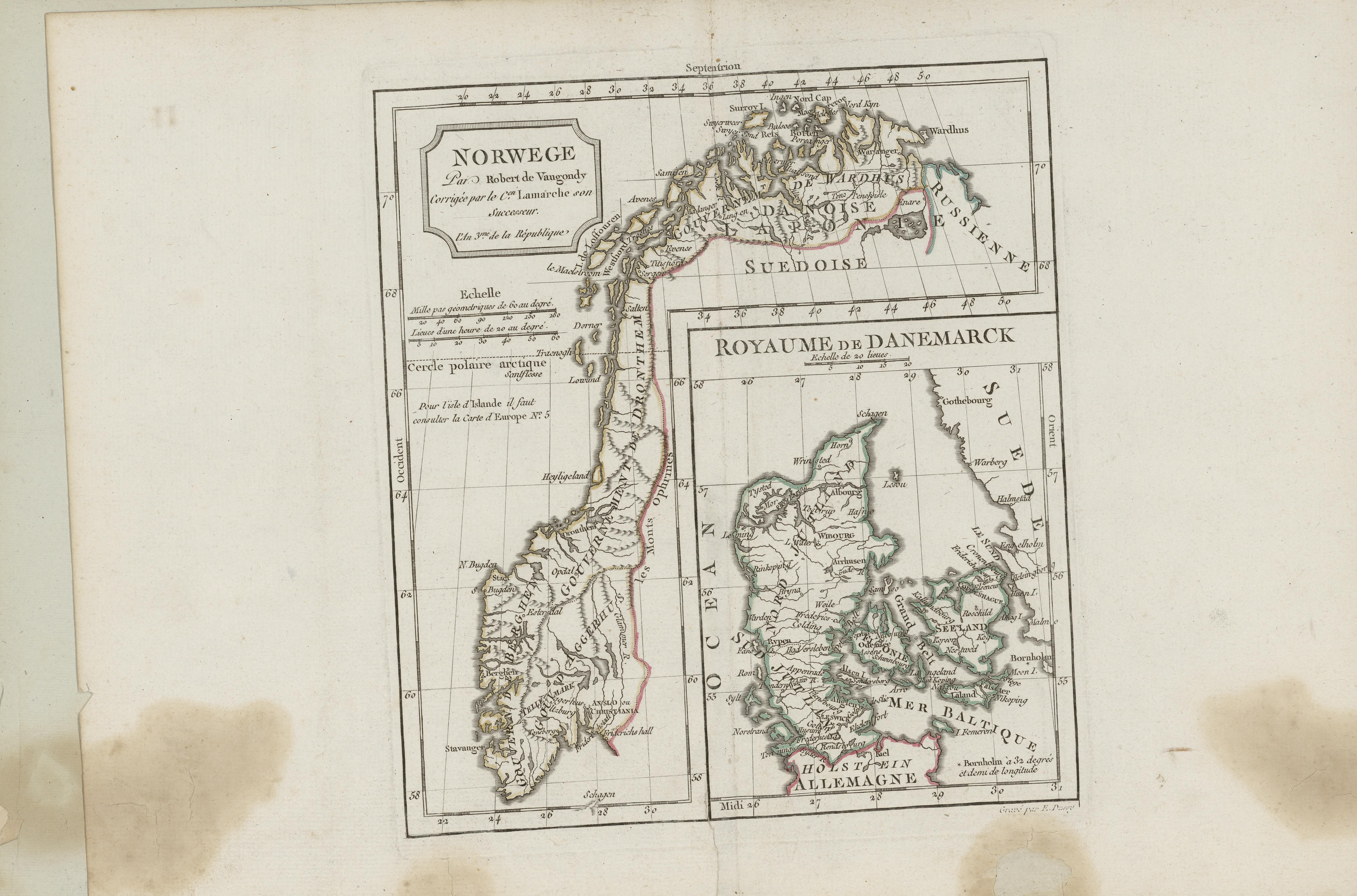 Illustrasjon hentet fra boken "Nouvel atlas portatif destiné principalement pour l'instruction de la jeunesse d'aprés la Géographie moderne de feu l'abbé Delacroix" av Vaugondy, Robert de og utgitt av Chez Lamarche (Paris, 1795)